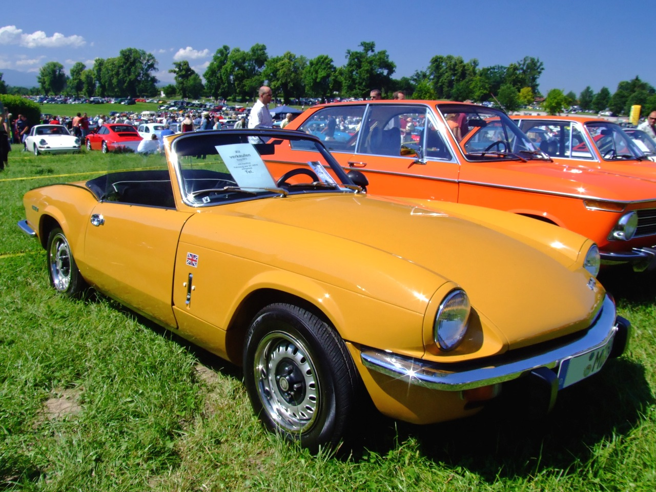 Quelle: selbst fotografiert, 06/2007 Fotograf: Späth Chr.